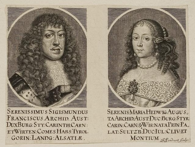 Grafik aus dem Klebeband Nr. 1 der Fürstlich Waldeckschen Hofbibliothek Arolsen Motiv: Si(e)g(is)mund Franz von Habsburg / Hedwig von Pfalz-Sulzbach